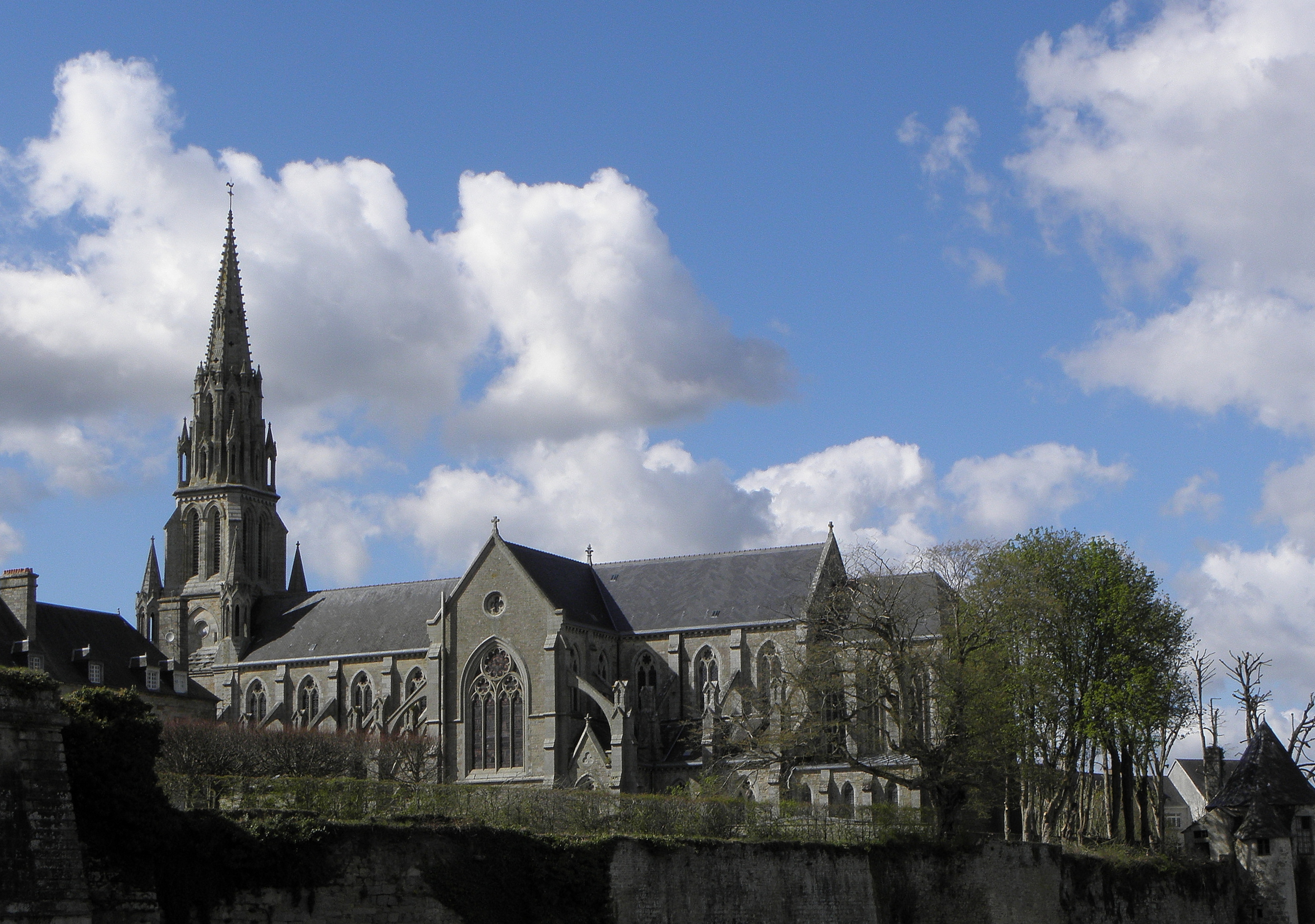 Flanc méridional de la basilique Notre-Dame-de-Délivrance à Quintin (22).